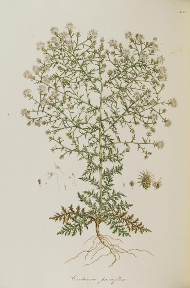 Legende: a Hülle (x1). A Hülle (vergr.). B Hüllblatt (vergr.). c Äußere Röhrenblüte (x1). C Äußere Röhrenblüte (vergr.). d Innere Röhrenblüte (x1). D Innere Röhrenblüte (vergr.). e Frucht (x1). E Frucht (vergr.). f Körbchenboden (x1).